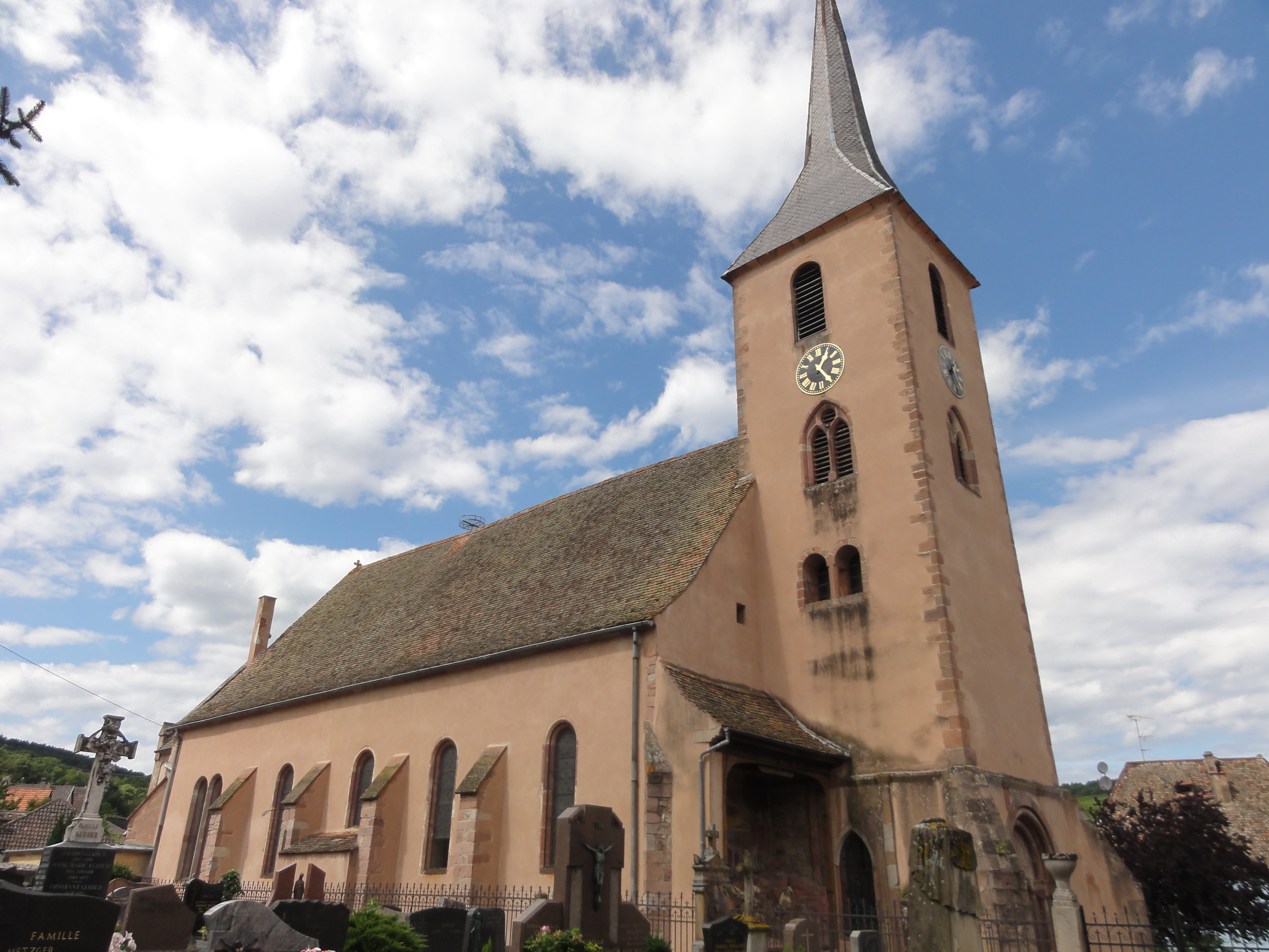 Alsace, Bas-Rhin, Église des Saints-Innocents de Blienschwiller (PA00084626, IA00115160).